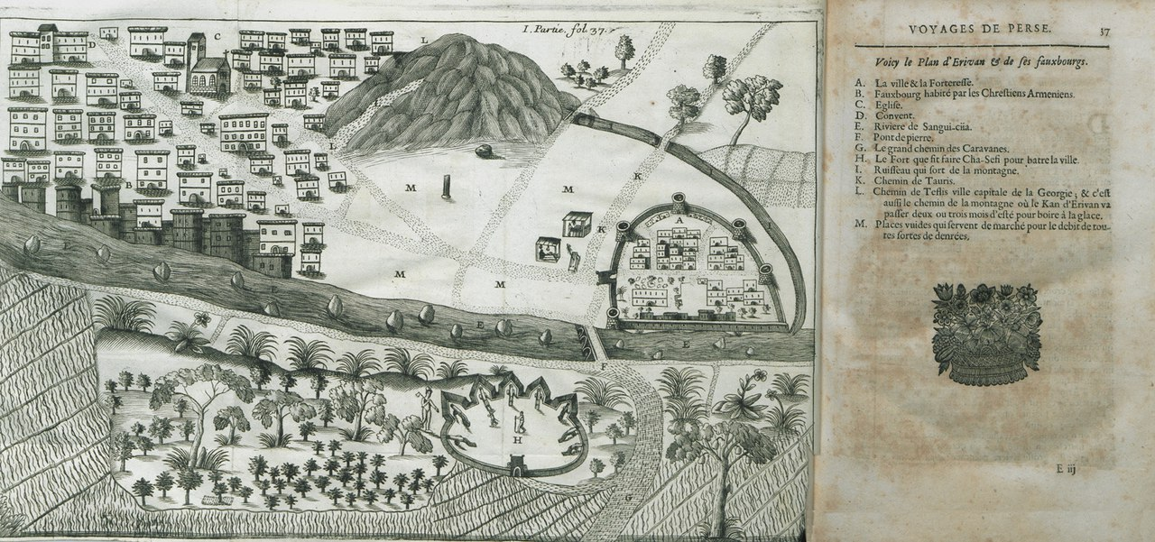 Панорама Еревана, 1655, гравюра из книги Тавернье Жан-Батист "Шесть путешествий в Турцию, Персию и Индию".